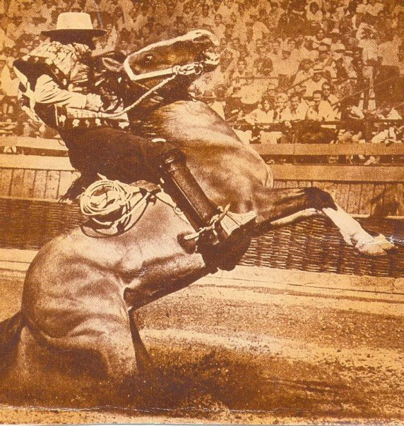 Santiago Urrutia montando a "Cachupín" en la final del movimiento de la rienda de 1973